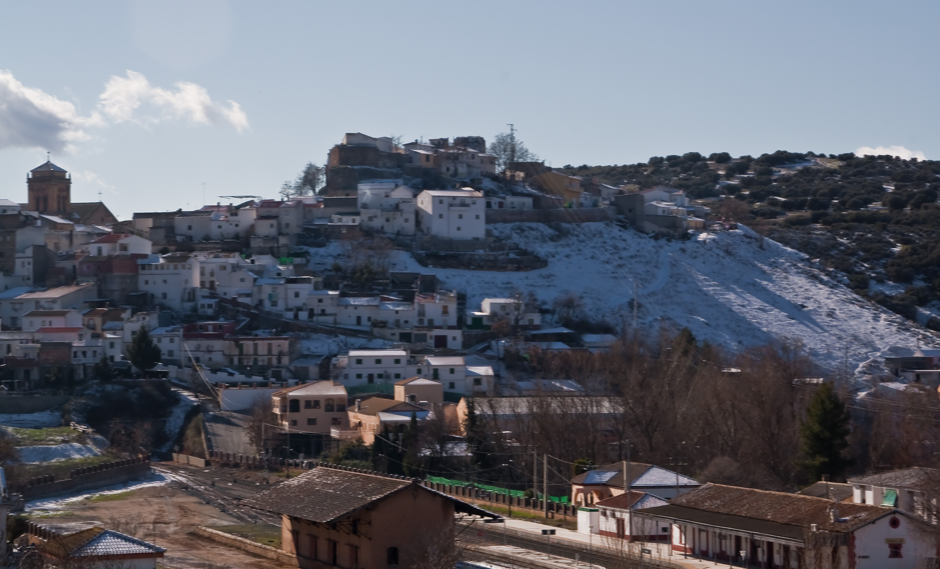 Iznalloz